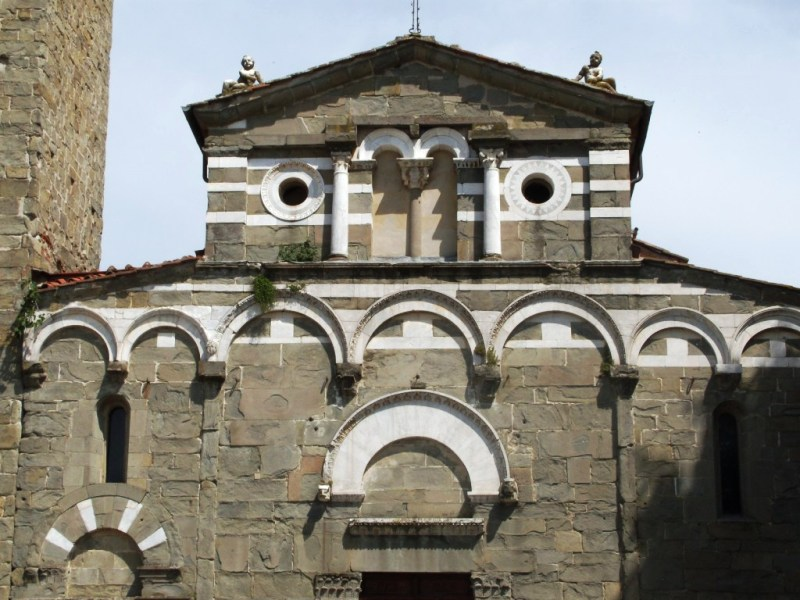 vista lato ovest della chiesa di san lorenzo